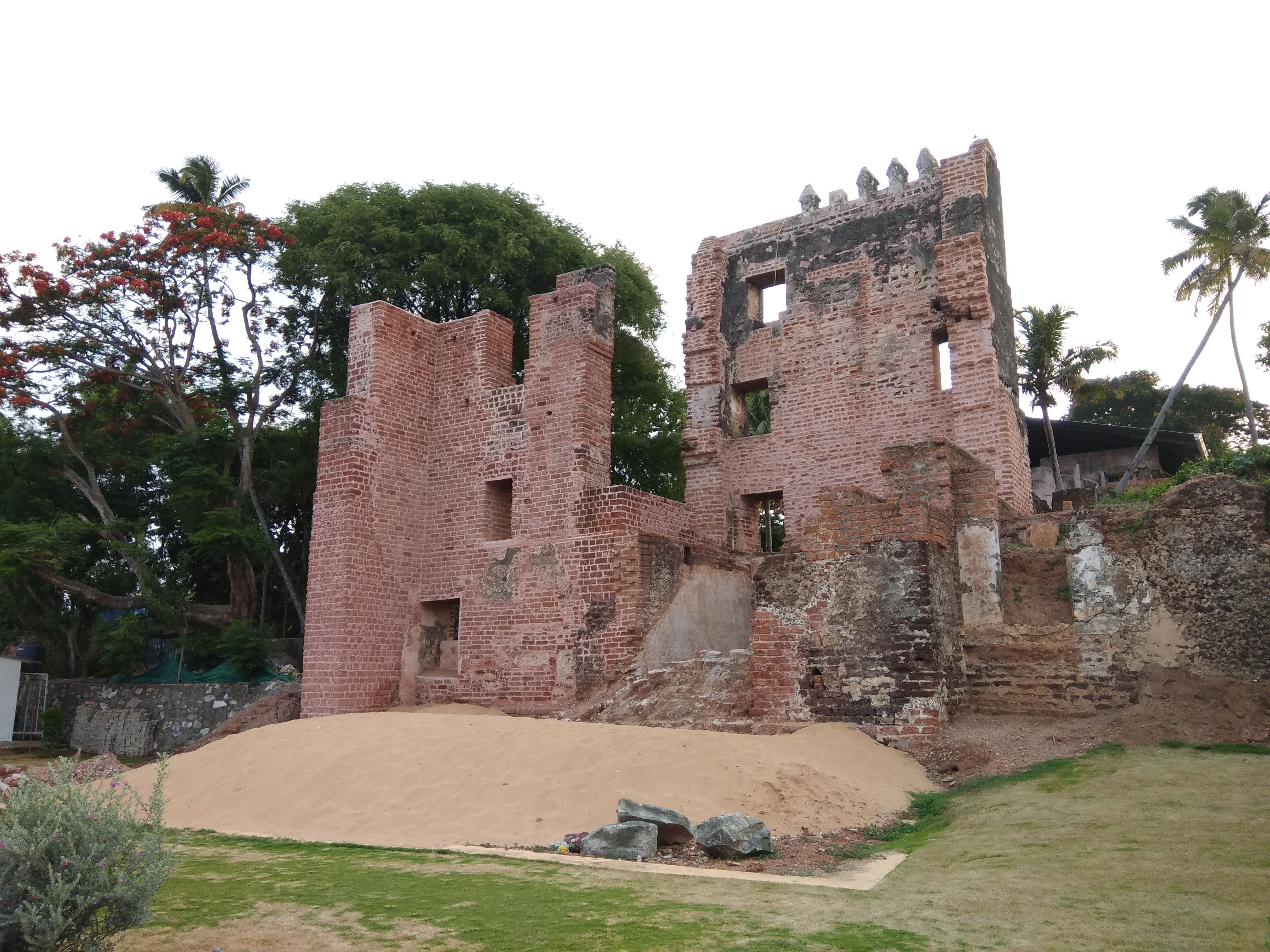 തങ്കശ്ശേരി കോട്ട